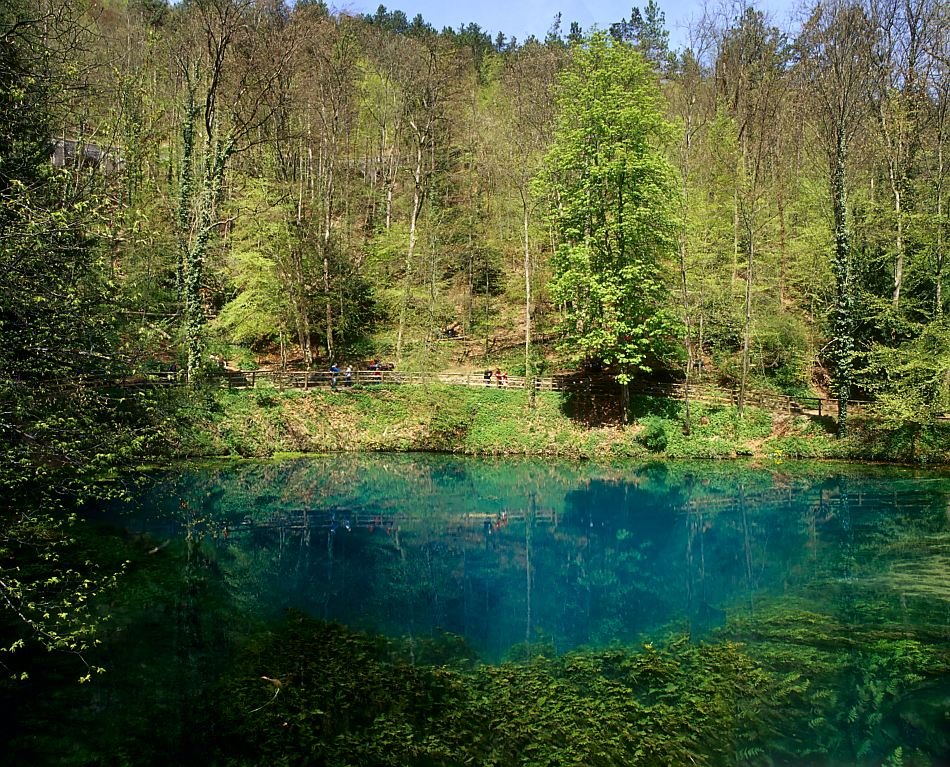 Blautopf in Blaubeuren von der Mühle aus